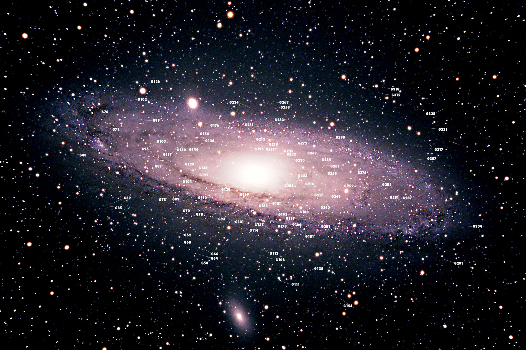 карта шаровых звездных скоплений М31 с названиями